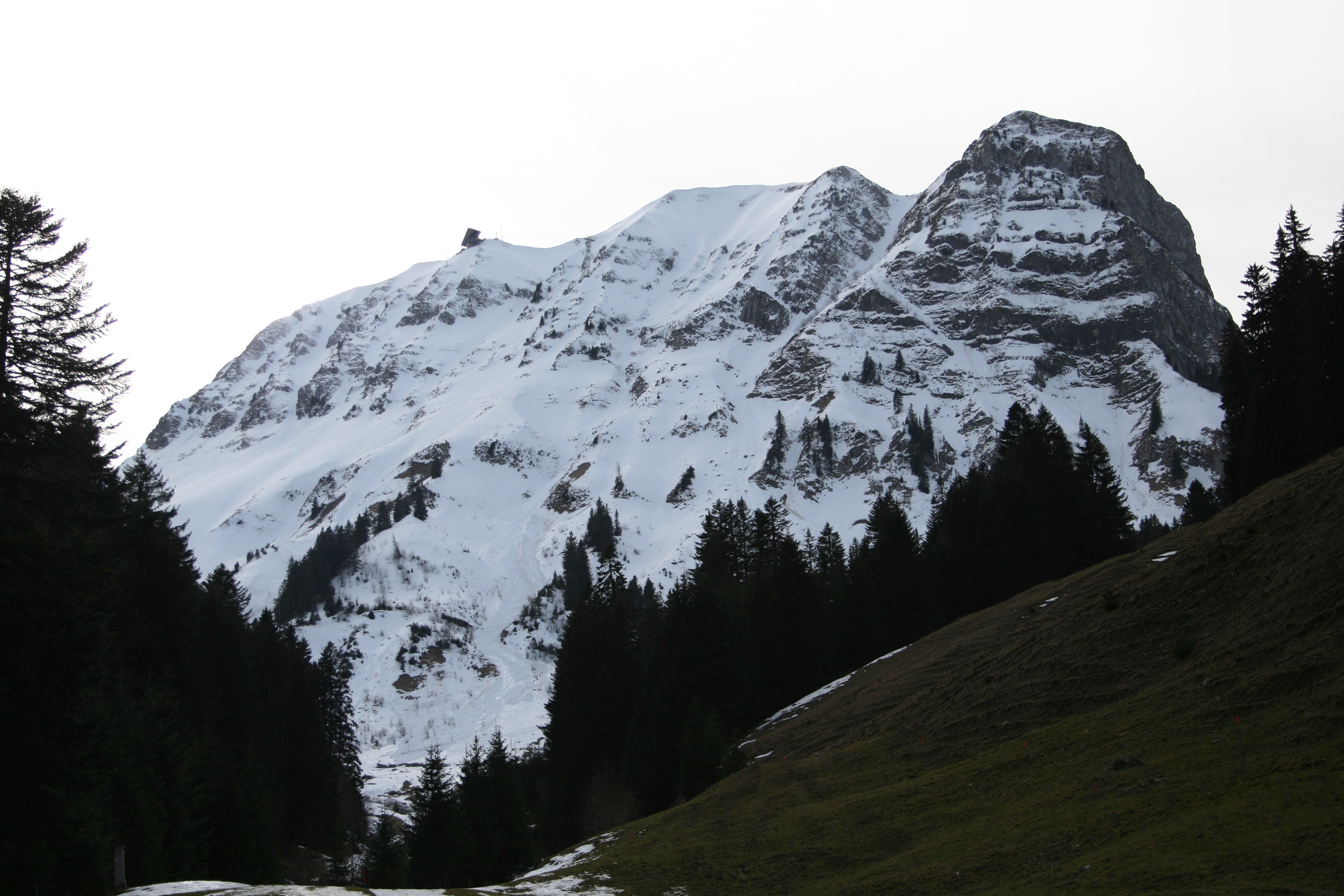 Le Moleson